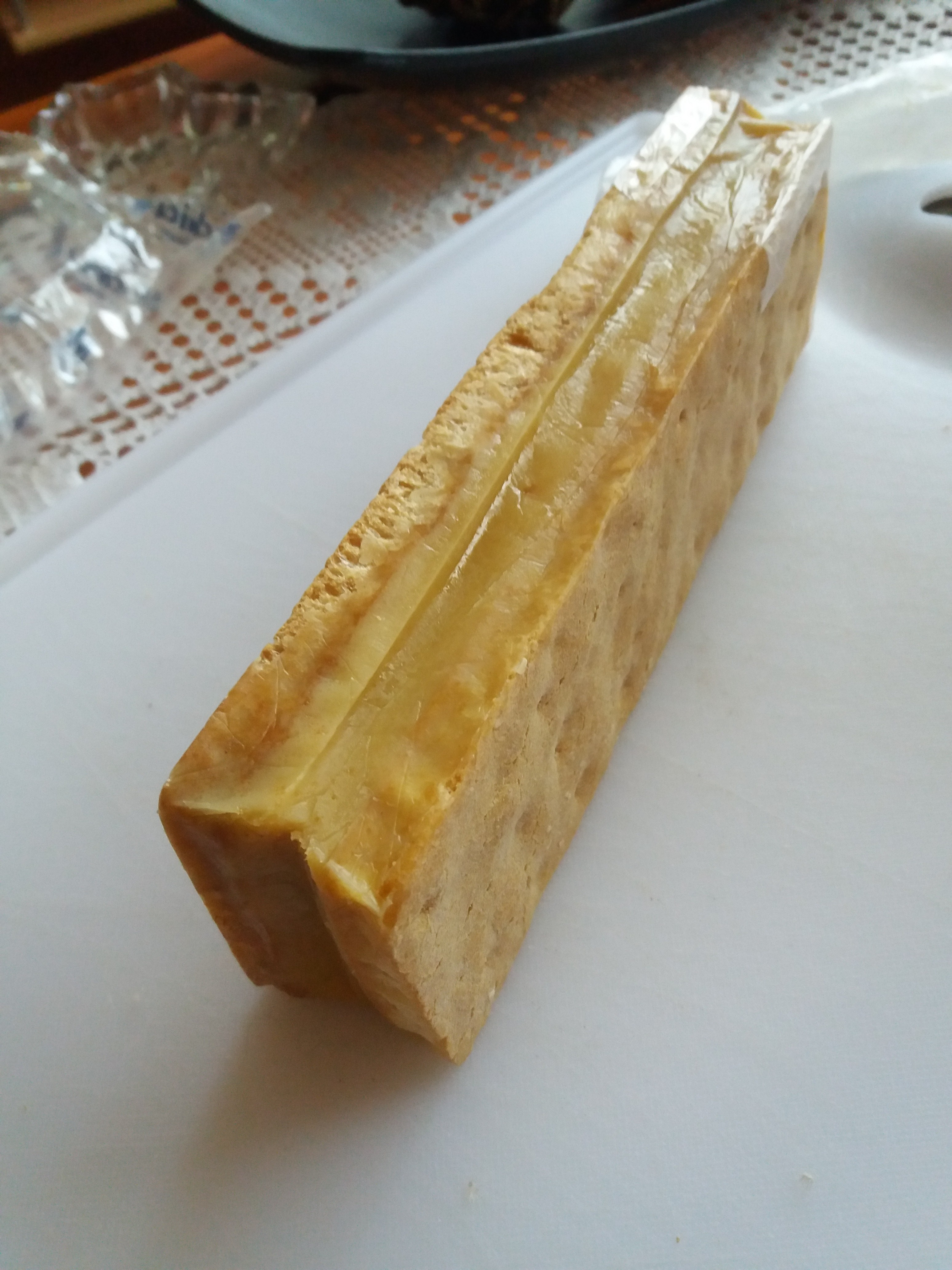 Barra rellena de manjarblanco, de Lambayeque (Perú)